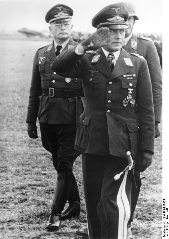 Scherl: Der Kommandierende General zu Besuch auf einem sizilianischen Flugplatz. General der Flieger Geisler, der kommandierende General des in Italien eingesetzten deutschen Fliegerkorps, stattete dem fliegenden Verband eines sizilianischen Flugplatz einen Besuch ab. Unser Bild zeigt General der Flieger Geisler beim Abschreiten der Front. Aufnahem: Krempl, 29.5.41 [Herausgabedatum]